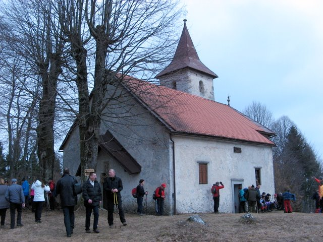 Holy Spirit church, Zavrtače